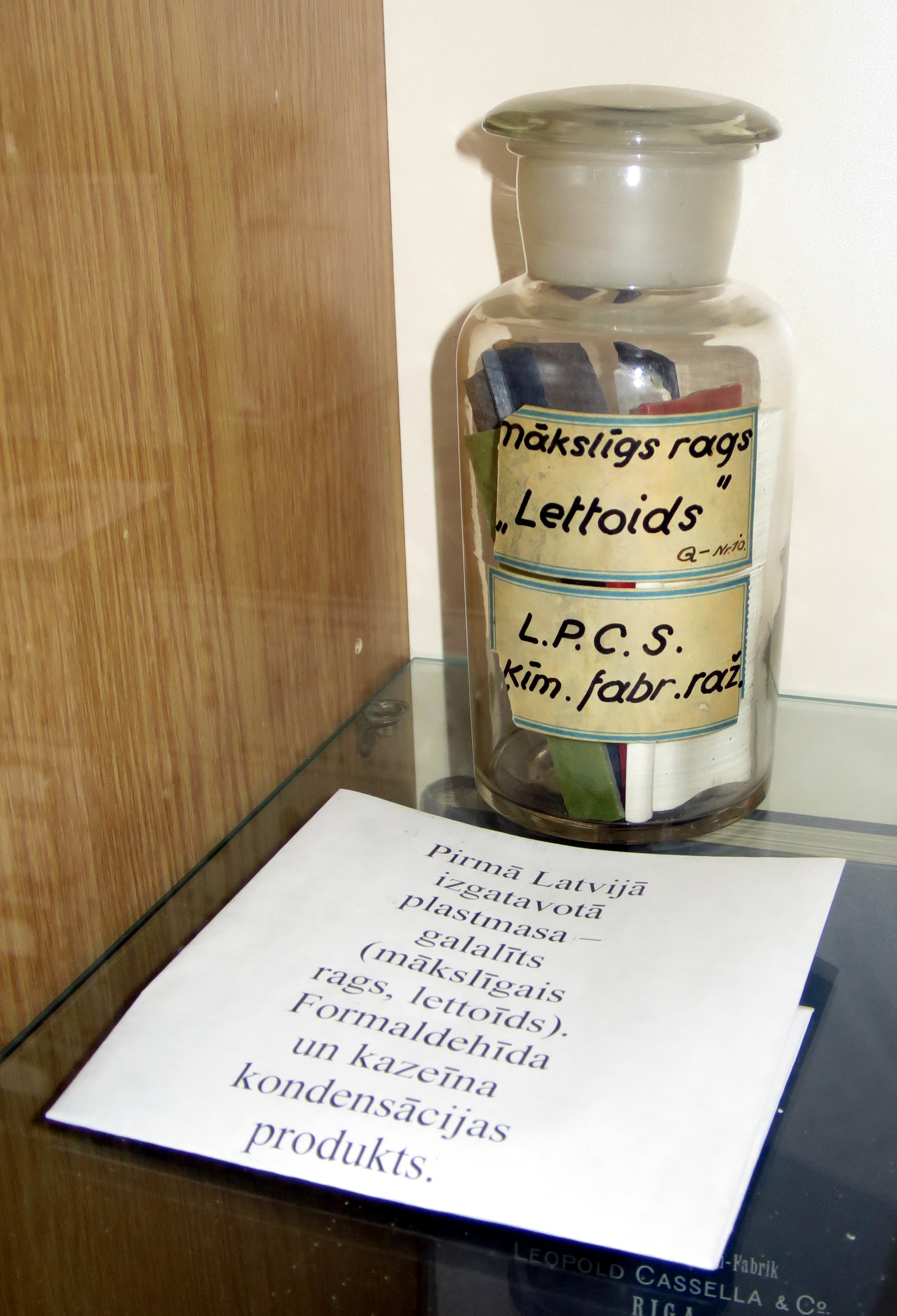 Pirmā Latvijā izgatavotā plastmasa Latvijas ķīmijas vēstures muzejā